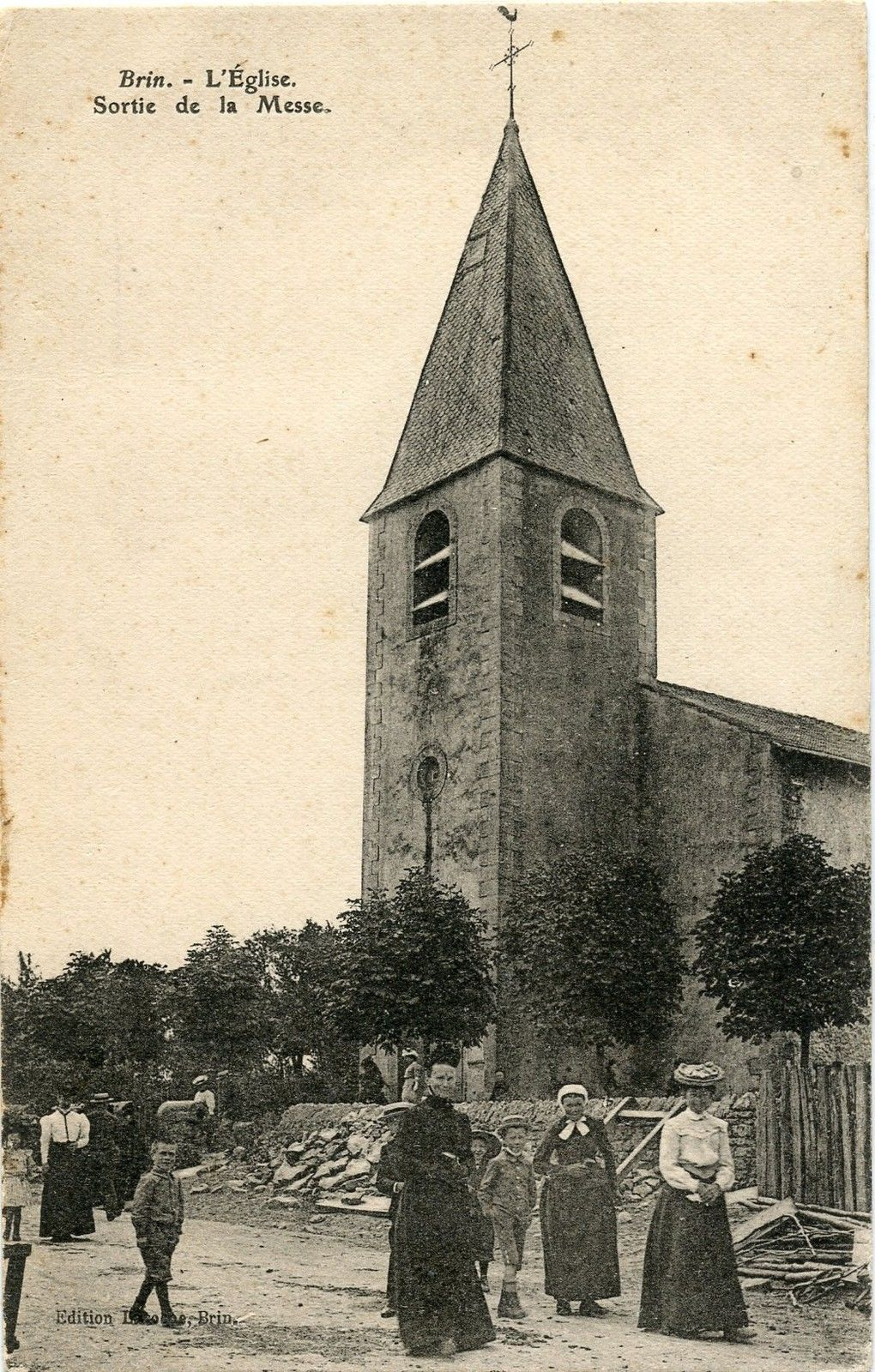 Brin-sur-Seille, sortie de messe entre 1905 et 1910.